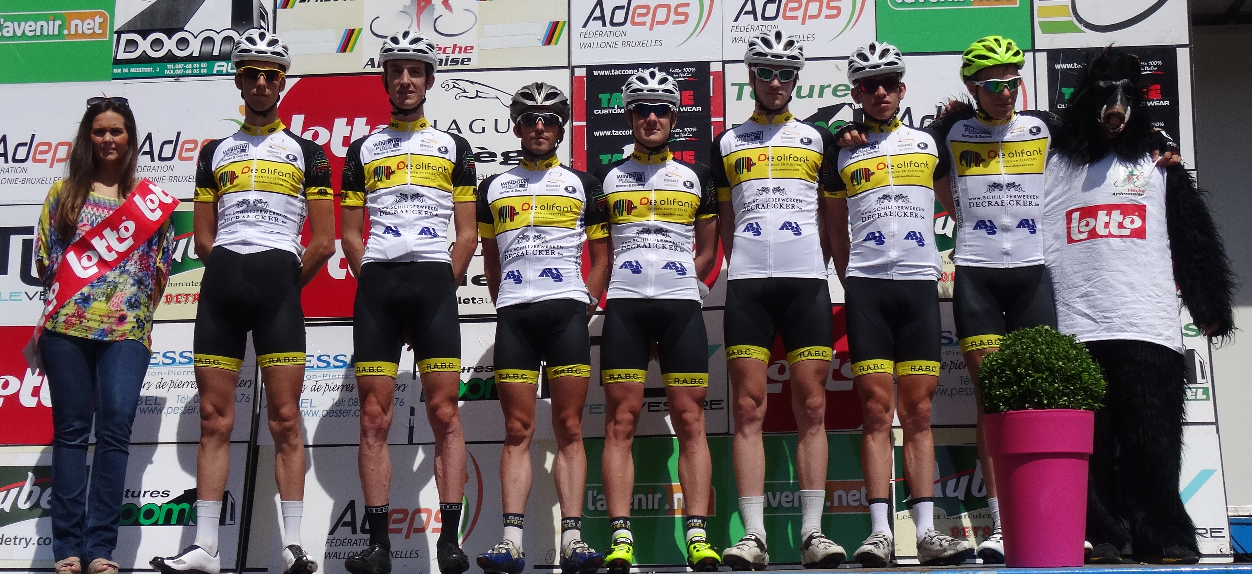 Reportage photographique réalisé le dimanche 22 juin à l'occasion du départ et de l'arrivée de la Flèche ardennaise 2014 à Herve, Belgique.